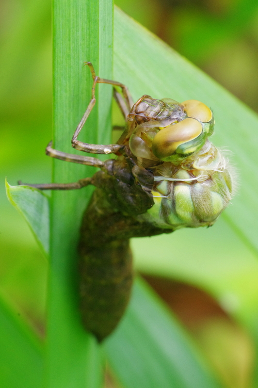 Żagnica sina (Aeshna cyanea) - przeobrażenie. Przez pęknięcie na grzbiecie zaczyna wysuwać się tułów imago.